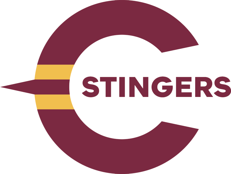 粵語: 滿地可協和大學黃蜂隊徽章（2015年－宜家）。